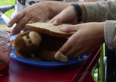 Deze afbeelding heeft mijn zoon Piet-Jan zelf gemaakt. Ik heb zijn toestemming deze afbeelding te doneren voor vrije verspreiding onder de voorwaarden van GNU Free Documentation License. For visitors from other countries: As a wikipedia volunteer I declare that my son Piet-Jan created this image himself. I have his permission to donate this image for free distribution under the GNU Free Documentation License.